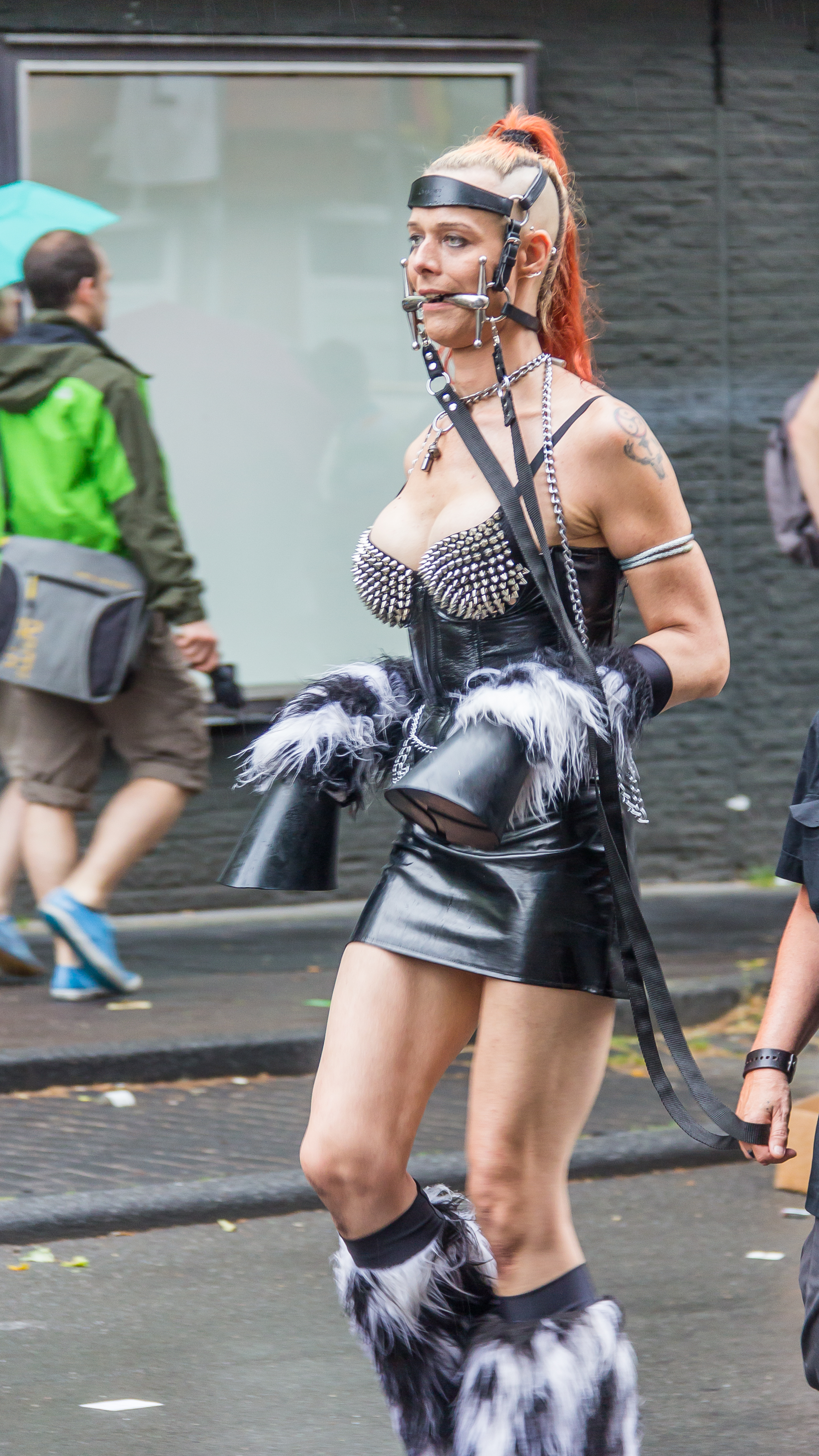 ColognePride 2014 - Straßenparade